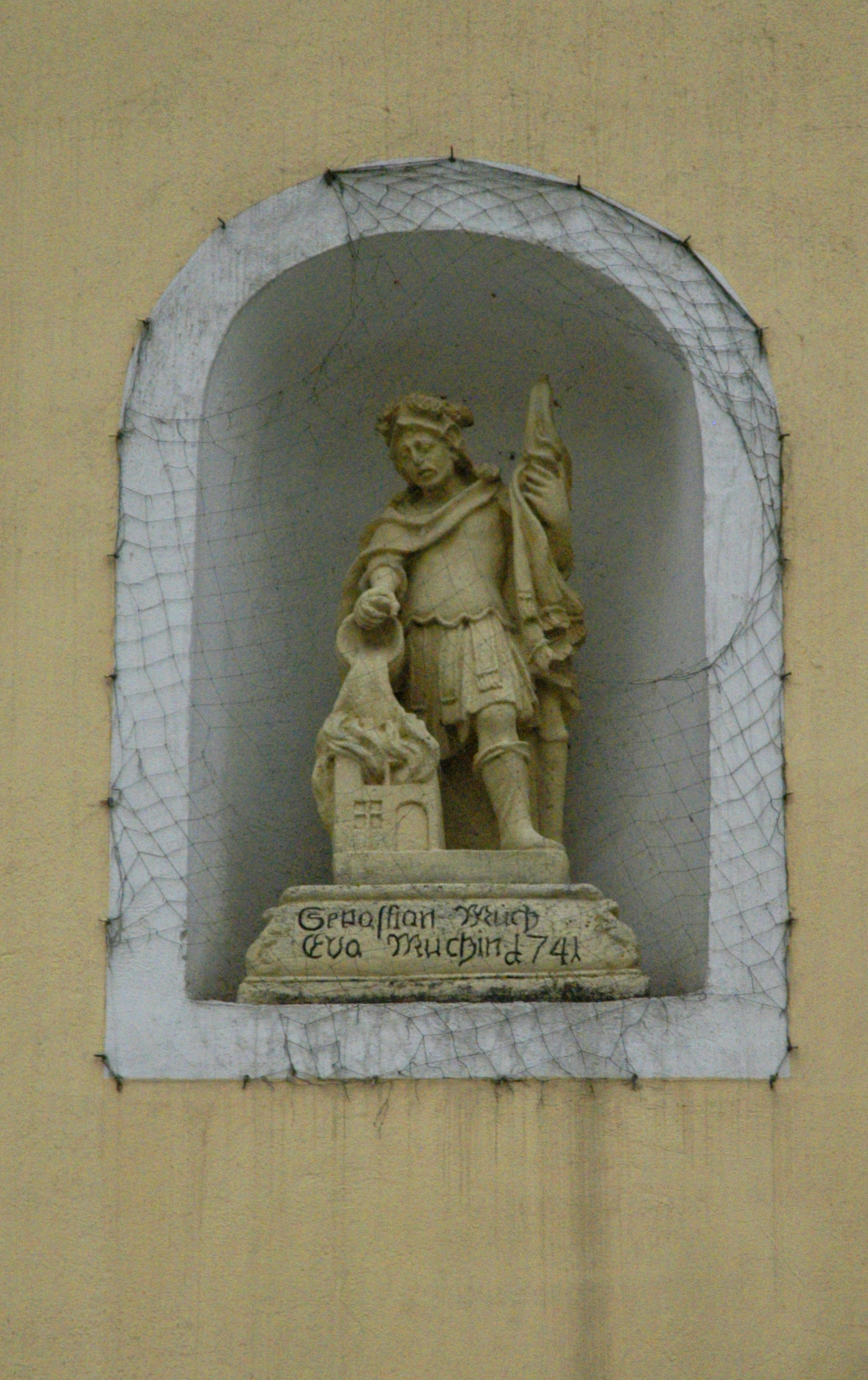 Figurennische mit Statuette des hl Florian an der Nordfassade der katholischen Pfarrkirche Maria Verkündigung in Goggendorf